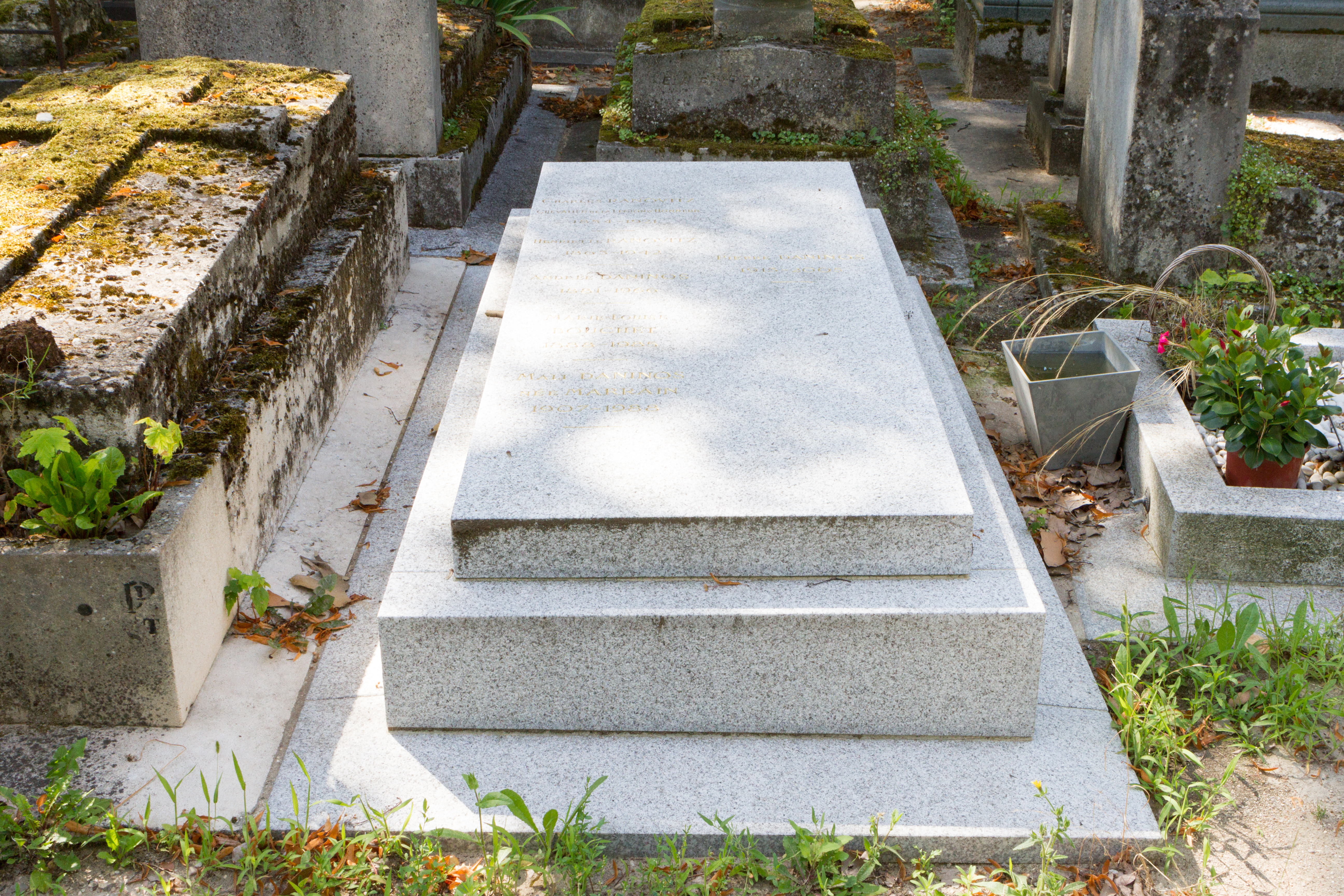 Sépulture de Pierre Daninos (1913-2005), écrivain et humoriste principalement connu pour Les Carnets du major Thompson (1954) ; Charles Ranovitz (1854-1921), négociant et expert près la Cour d'appel.